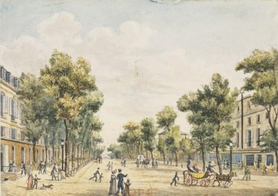 Boulevard Montmartre et café Frascati, Paris IIe. Dessin à la plume, encre de Chine et aquarelle, 6,7 x 9,4 cm, par Christophe Civeton (1796-1831), en provenance de la collection Hippolyte Destailleur.